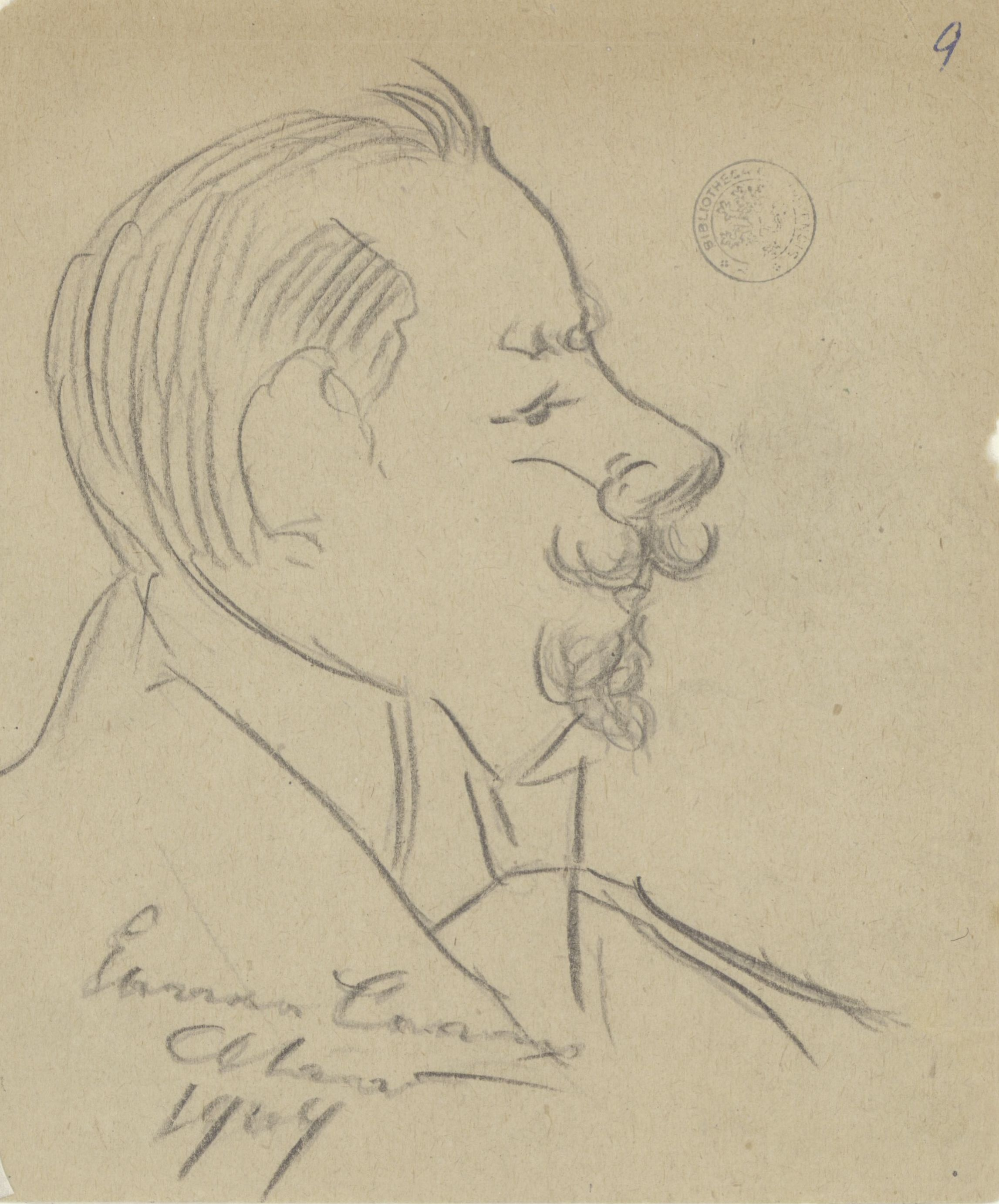 Meer dan waarschijnlijk portret van Ernest Van Glabbeke (Oostende, 1868-1947) uit [verzamelband] Karikaturen Getekend Door Enrico Caruso (1906 & 1909, Universiteitsbibliotheek Gent)